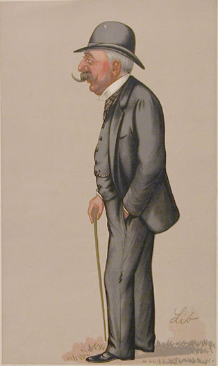 Caricature of Baron Moritz von Hirsch auf Gereuth.